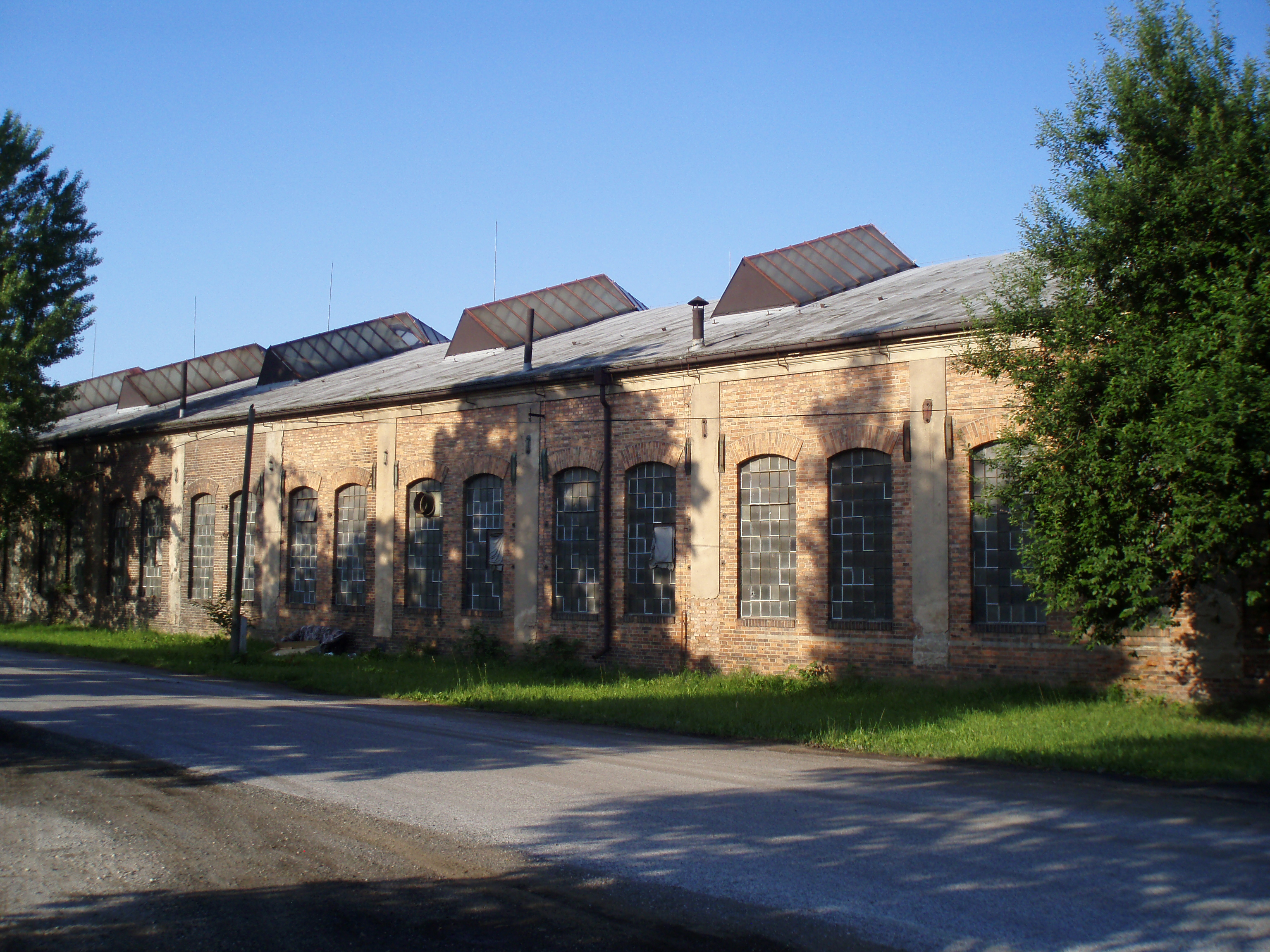 Hala bývalého Montasu v Hradci Králové